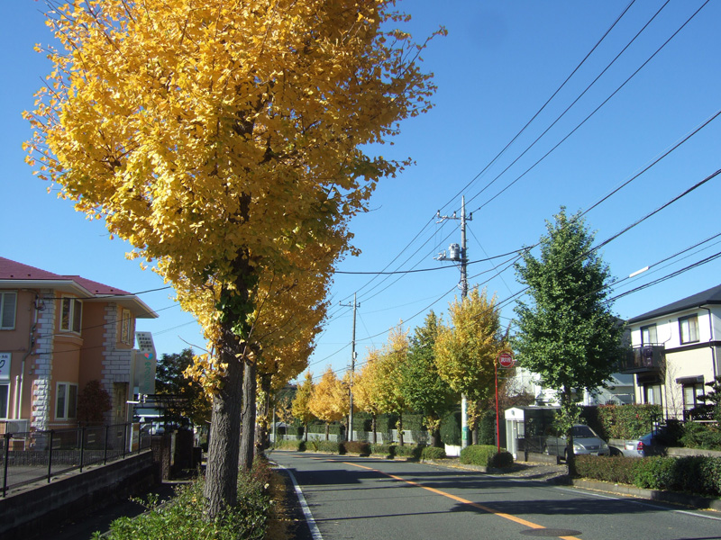 王禅寺東４丁目22-23交差点